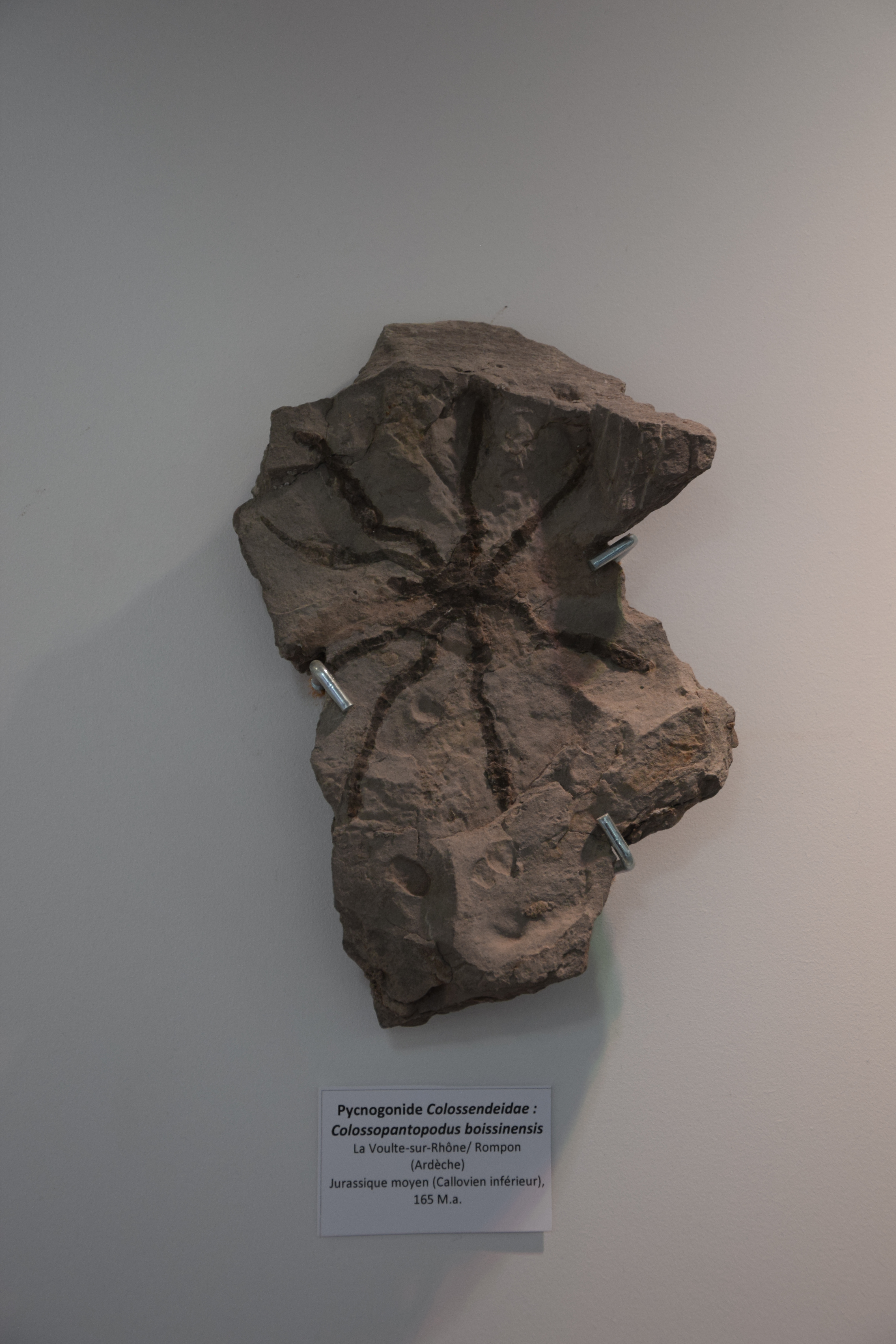 Muséum de l'Ardèche